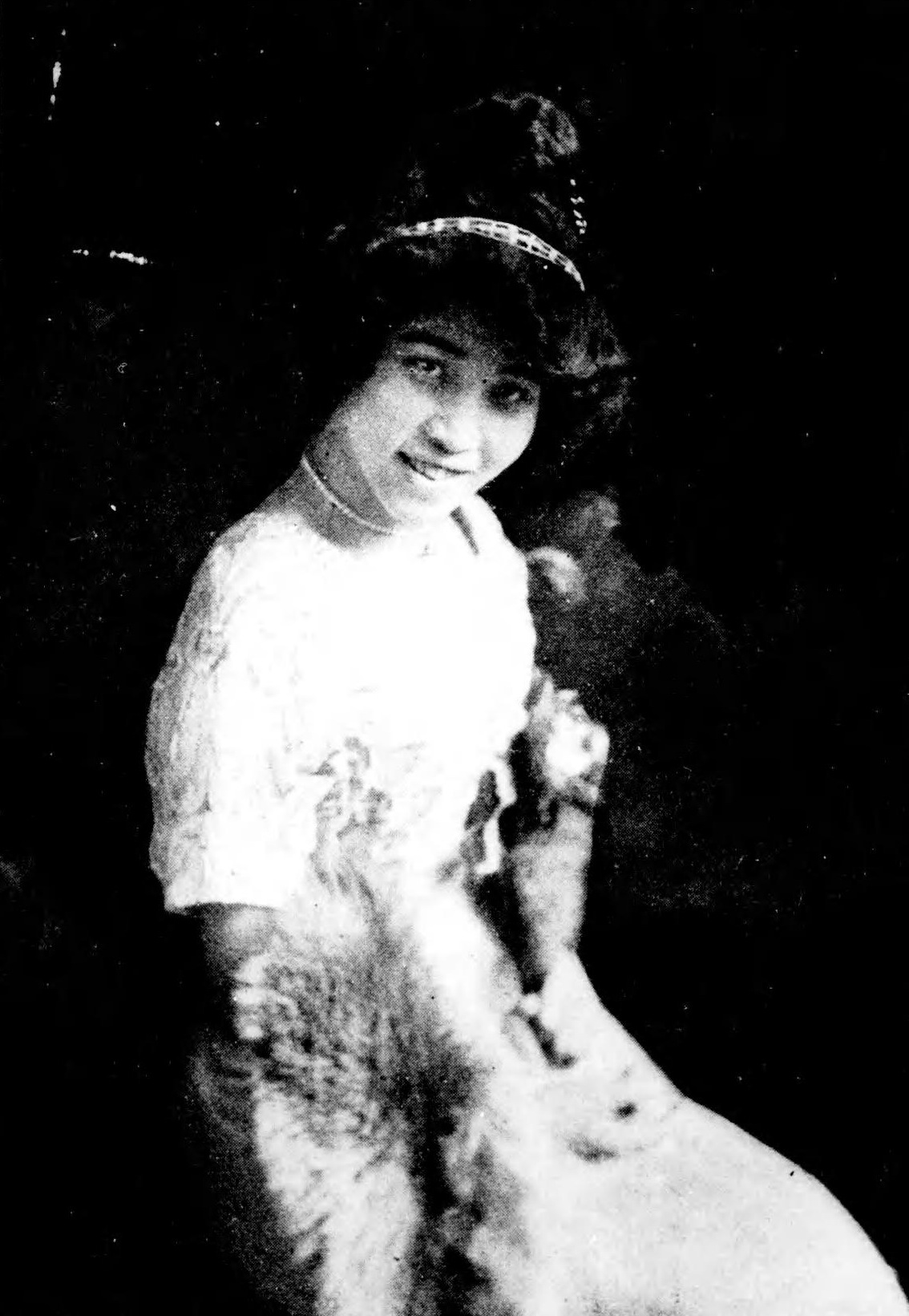 高木 徳子（たかぎ とくこ、旧姓永井、1891年2月15日 - 1919年3月30日）は、日本のダンサーである。(Tokuko Takagi)